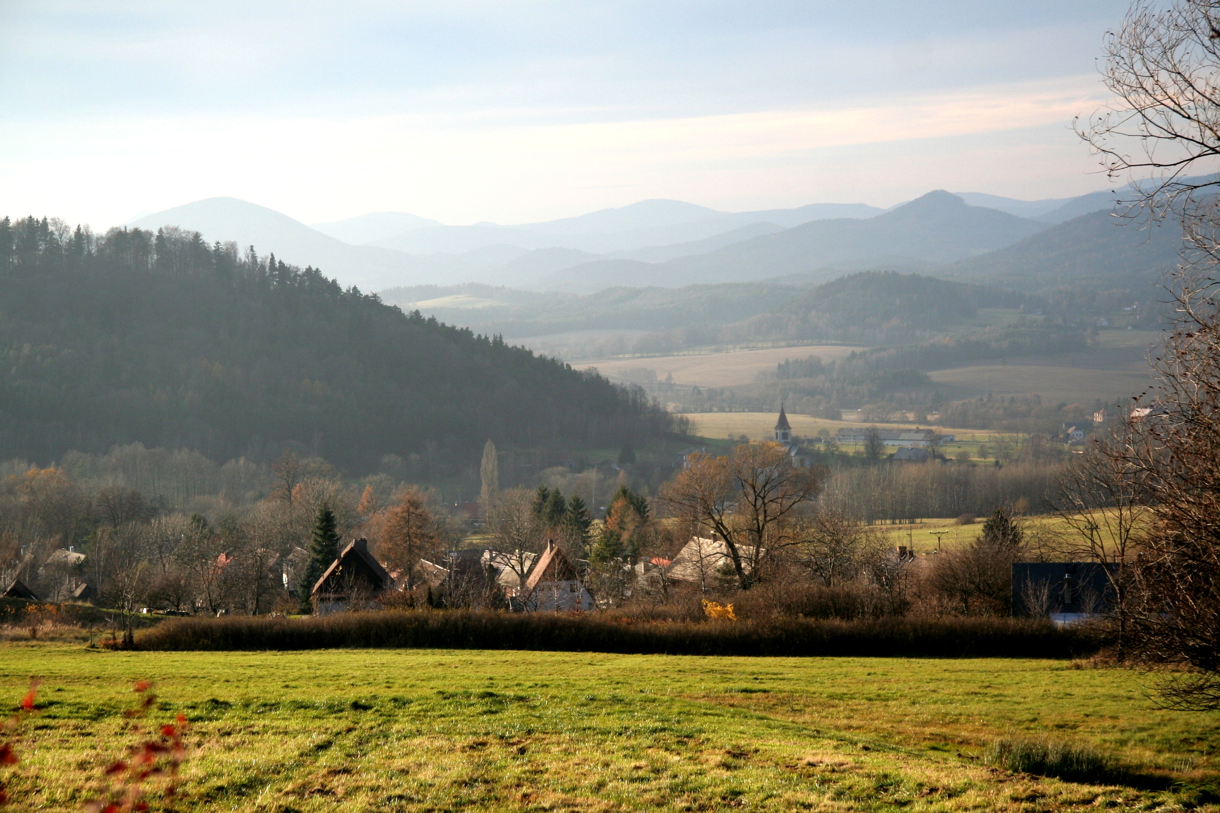 Blick über Deutsch Pankraz / Jitrava